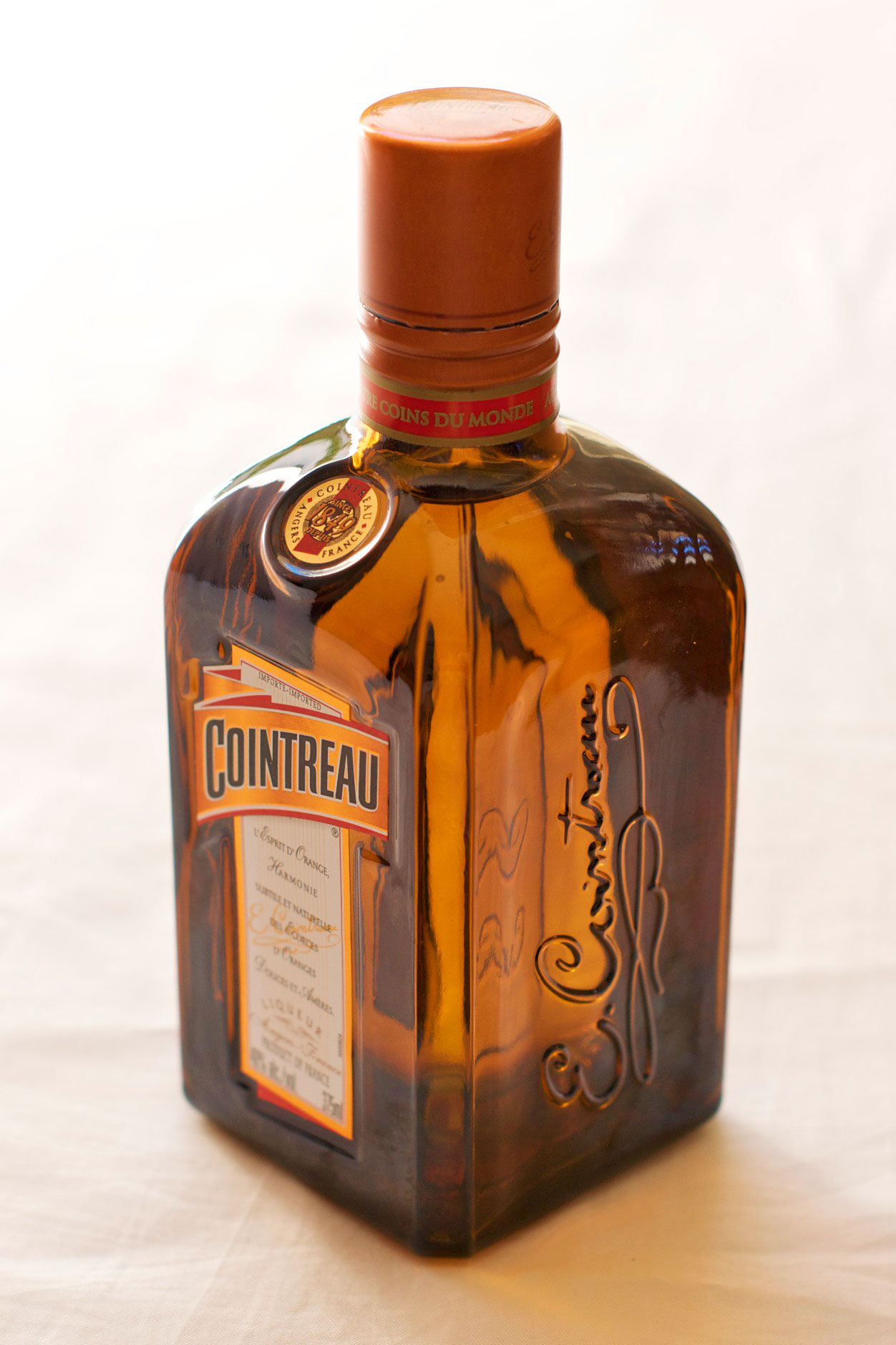 コアントローの瓶